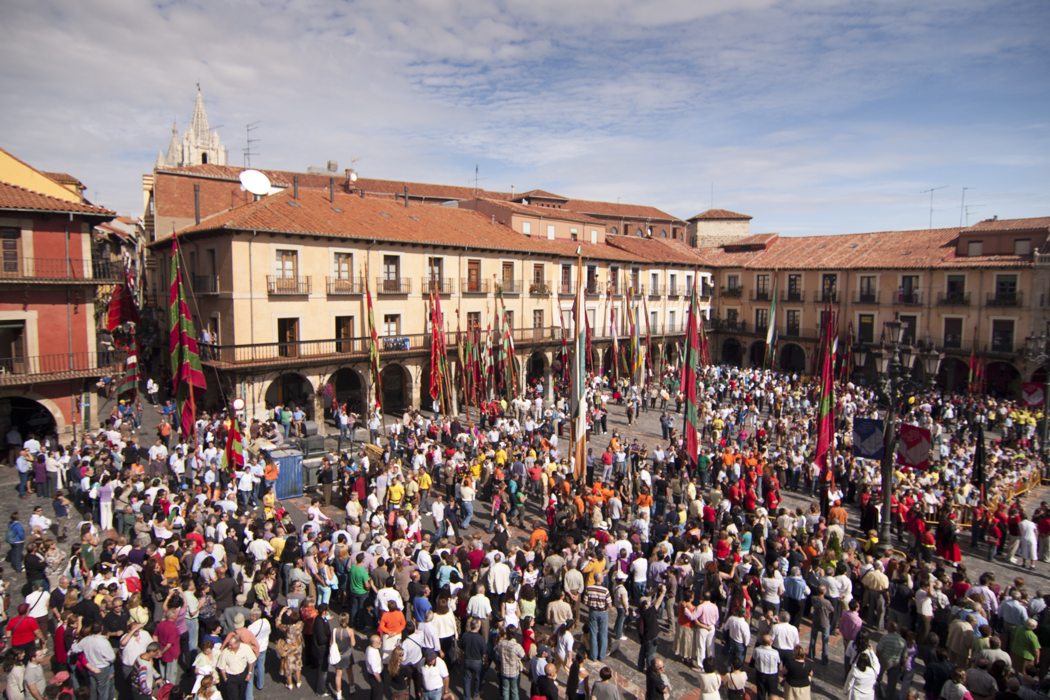 Romería de San Froilán, León, España. Octubre de 2009. Foto realizada desde el balcón del Consistorio de la Plaza Mayor. This is a photography of a Folklore festival in Spain (Wikidata id Q23658046).